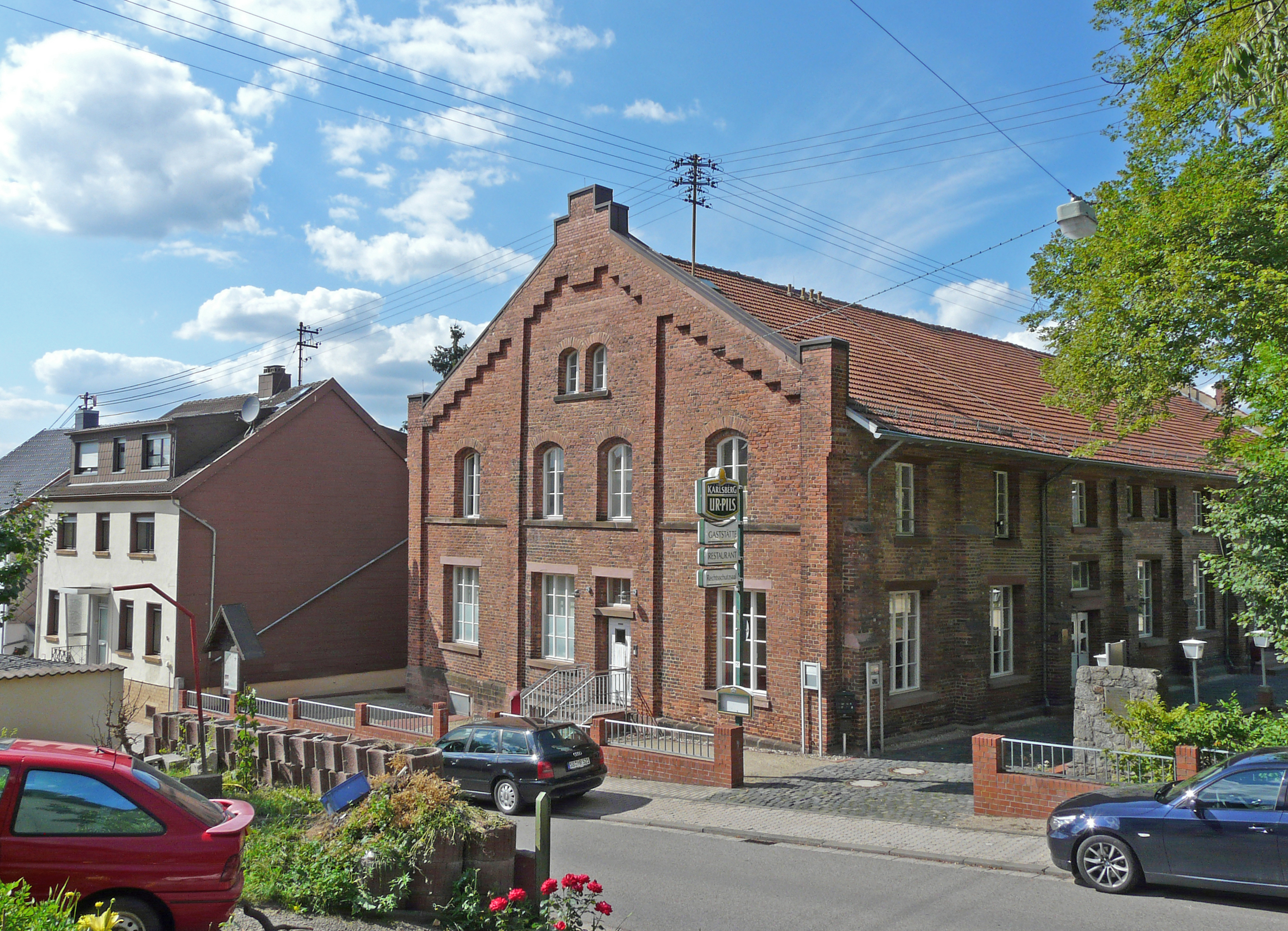 Bildinhalt: Rechtsschutzsaal in Bildstock, Südseite zur Straße hin Aufnahmeort: Friedrichsthal-Bildstock, Deutschland Aufnahmetag: 2010-08-06 Fotograf: Frank C. Müller, Baden-Baden Uploader: Frank C. Müller, Baden-Baden